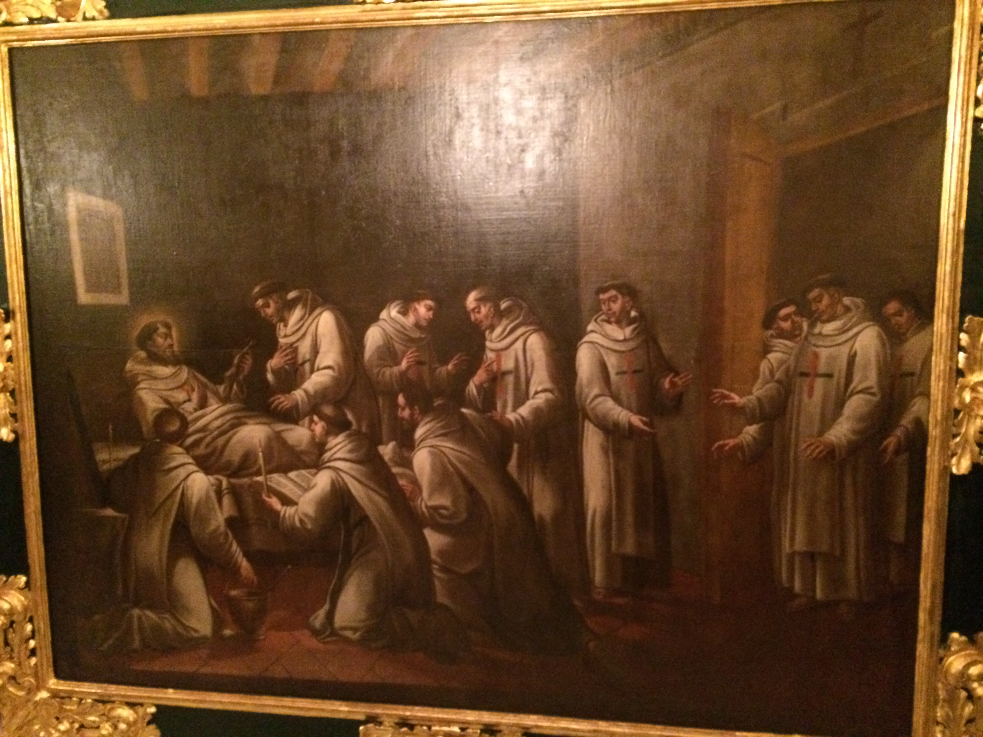 Lienzo de 3x2.20 situado en la iglesia de Ntra. Sra de Gracia de Córdoba. Trinitarios